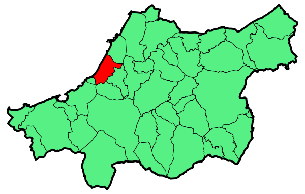 Bidarte herri lapurtarraren kokapena